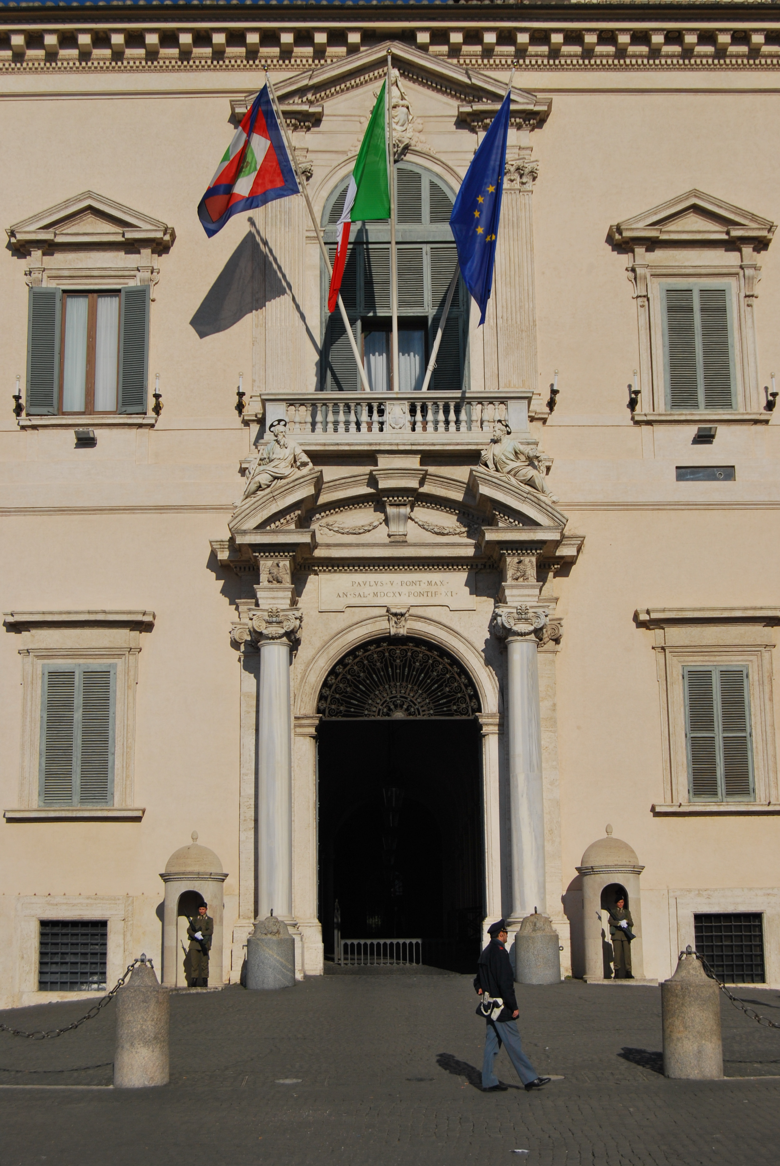 Palazzo del Quirinale (esterno) - MIBAC This is a photo of a monument which is part of cultural heritage of Italy.